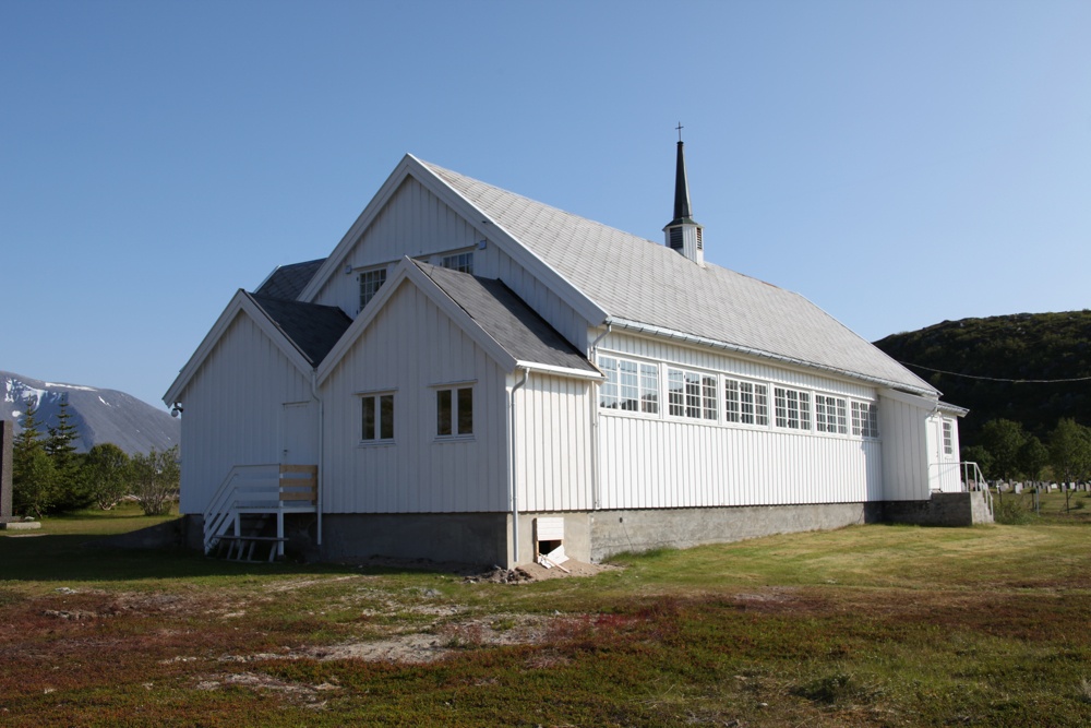 Sengskroken kirke on Vannøya in Karlsøy, Troms